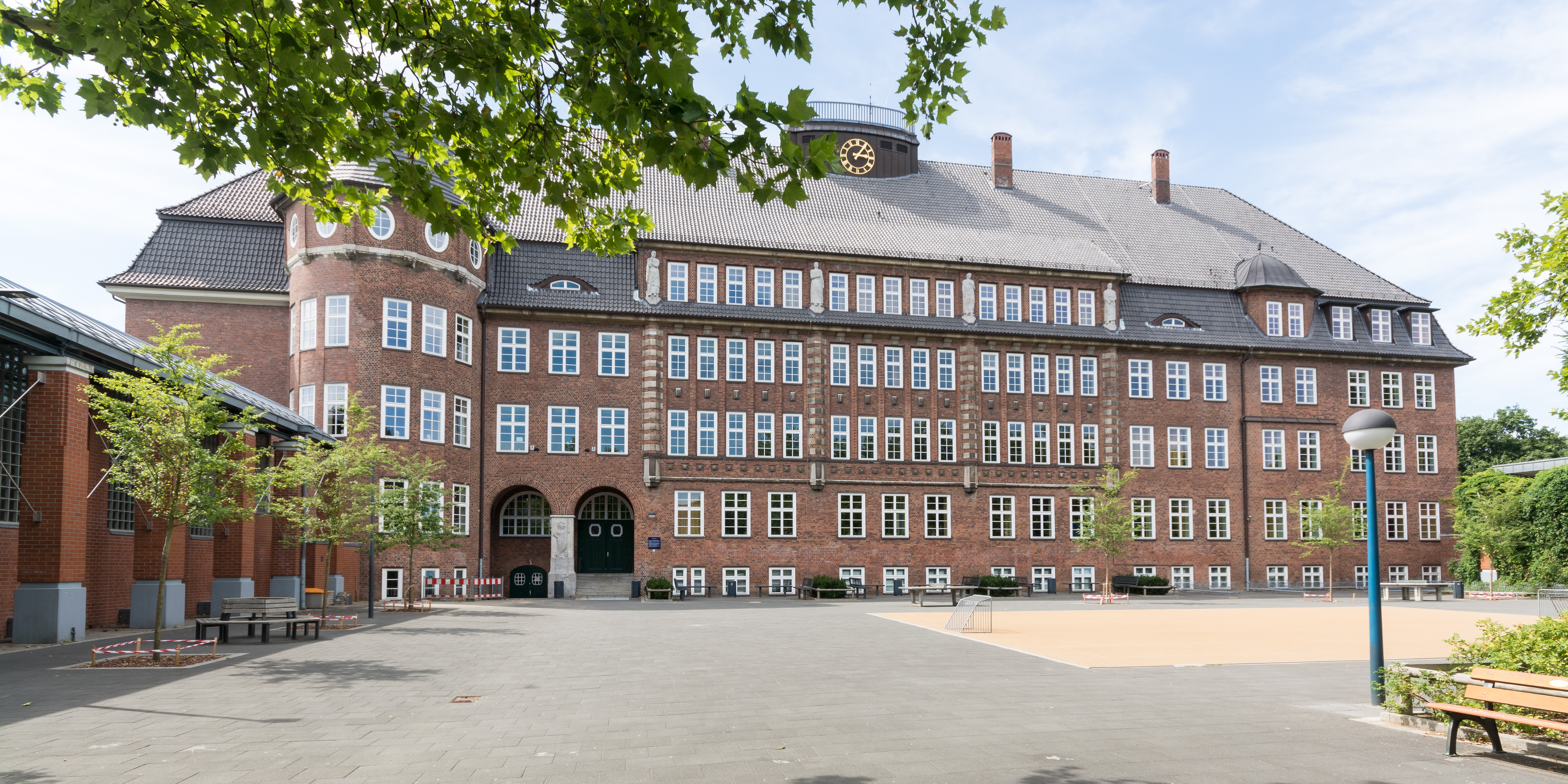 Hansa-Gymnasium in Hamburg-Bergedorf. This is a photograph of an architectural monument.